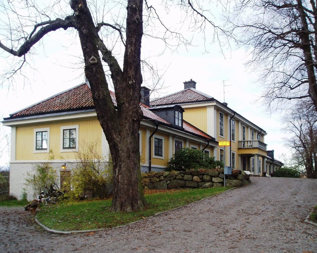 Älvsjö gård, Stockholm